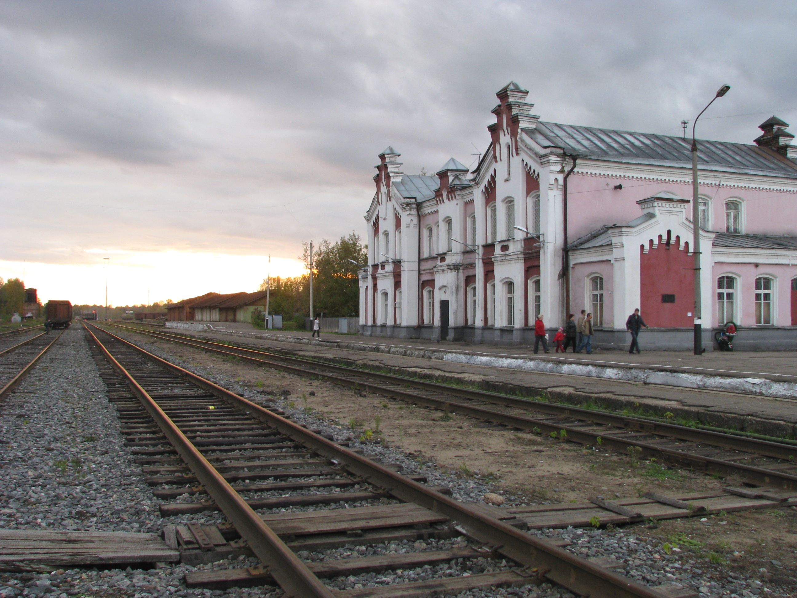 Станция Кинешма